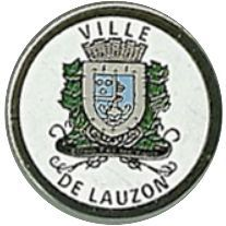 Les armoires de l'ancienne Ville de Lauzon.